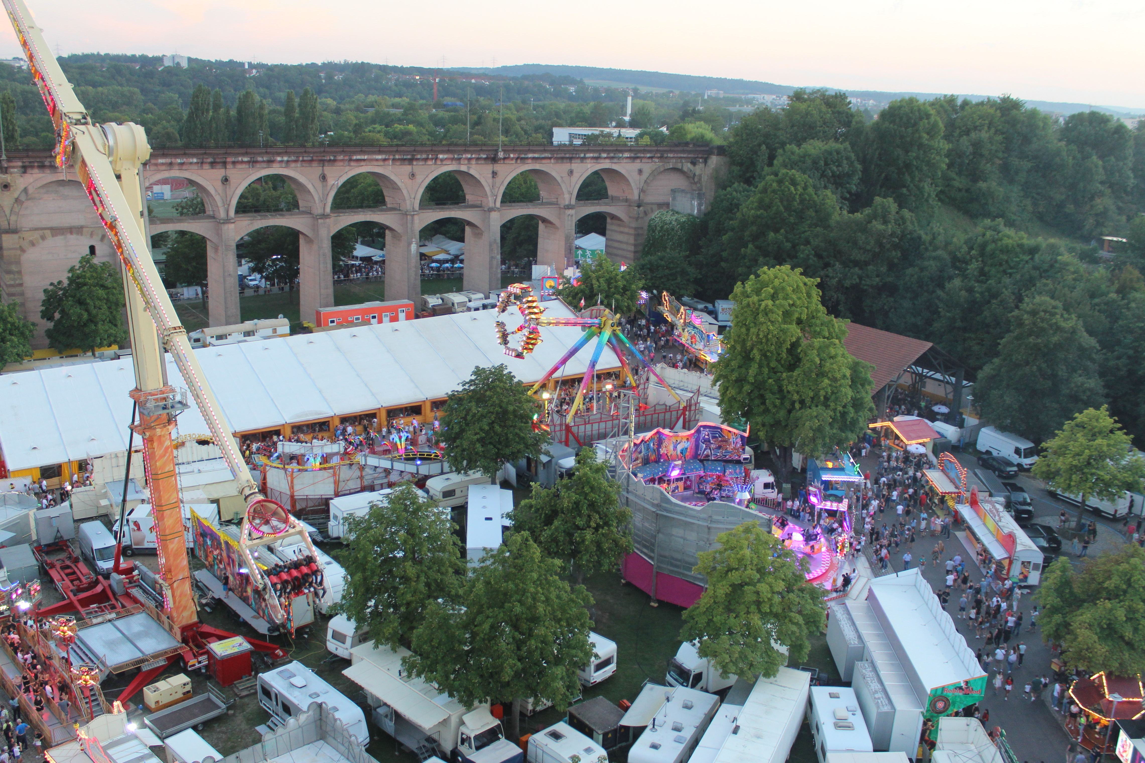 Bietigheimer Pferdemarktes 2019, fotografiert vom Riesenrad